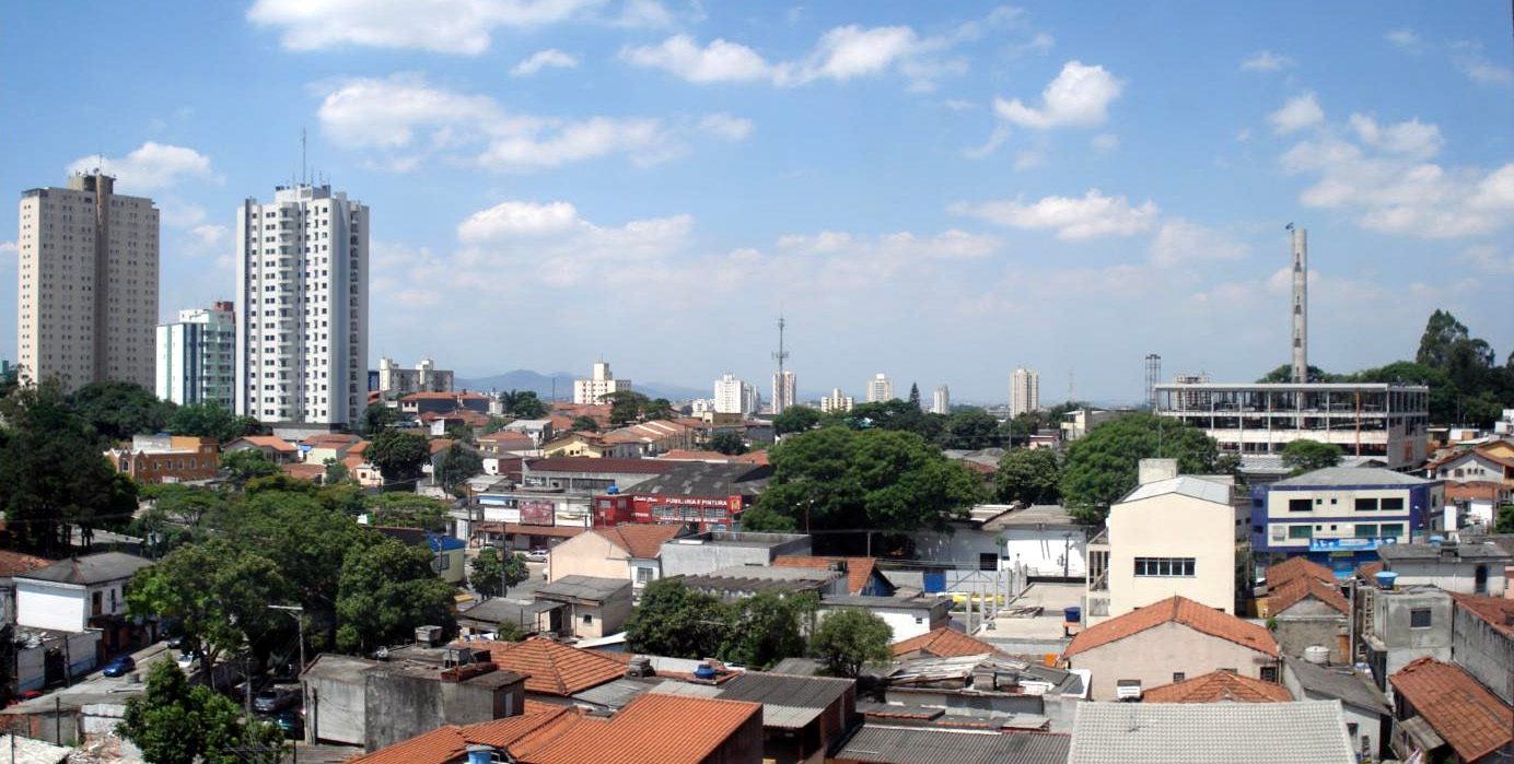 Uma visão do Bairro Gopoúva em Guarulhos. Ao lado direito a nova torre d'água da SAAE.